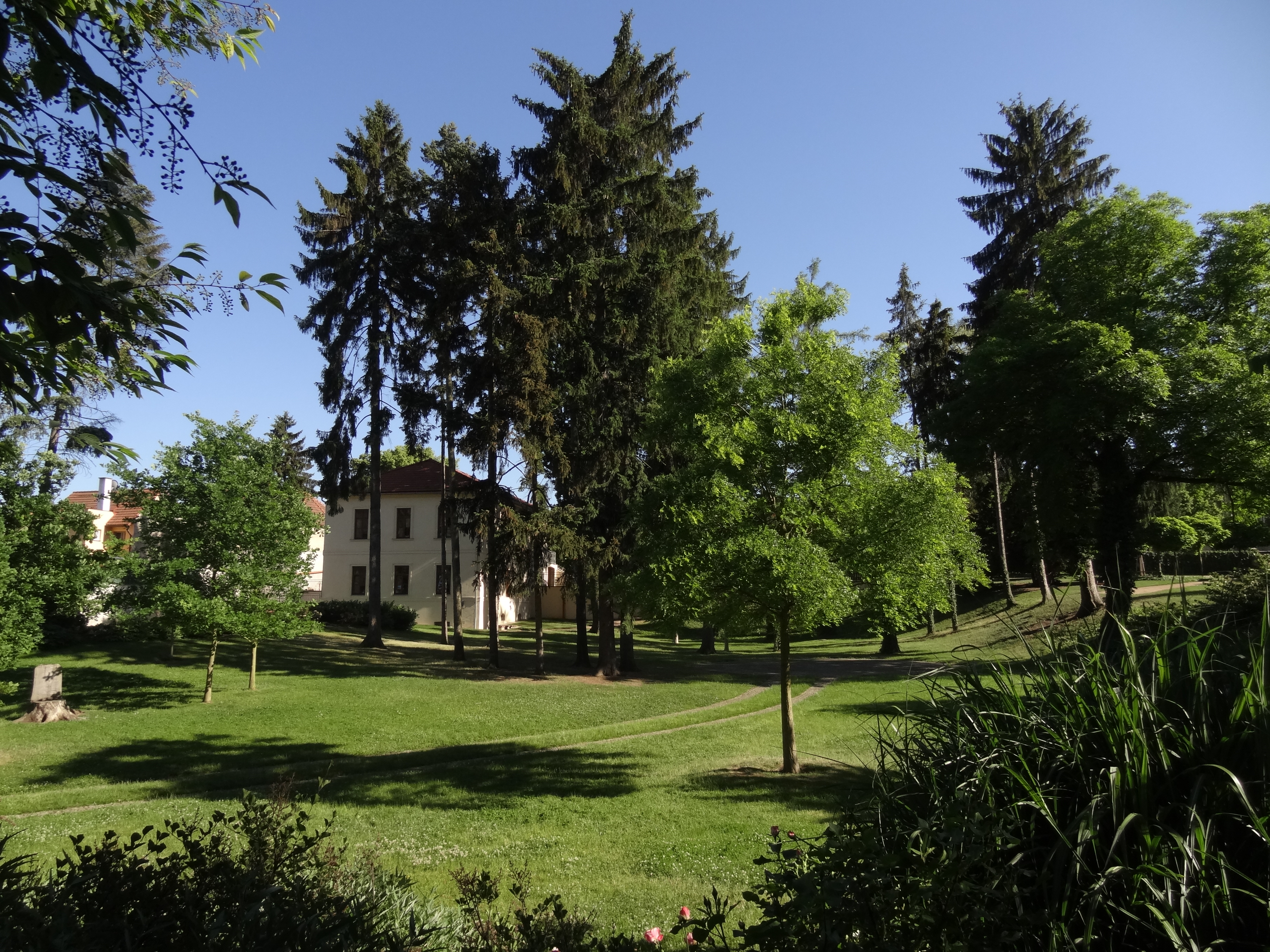 Park profesora Procházky u vily čp. 87 v Lázních Toušni